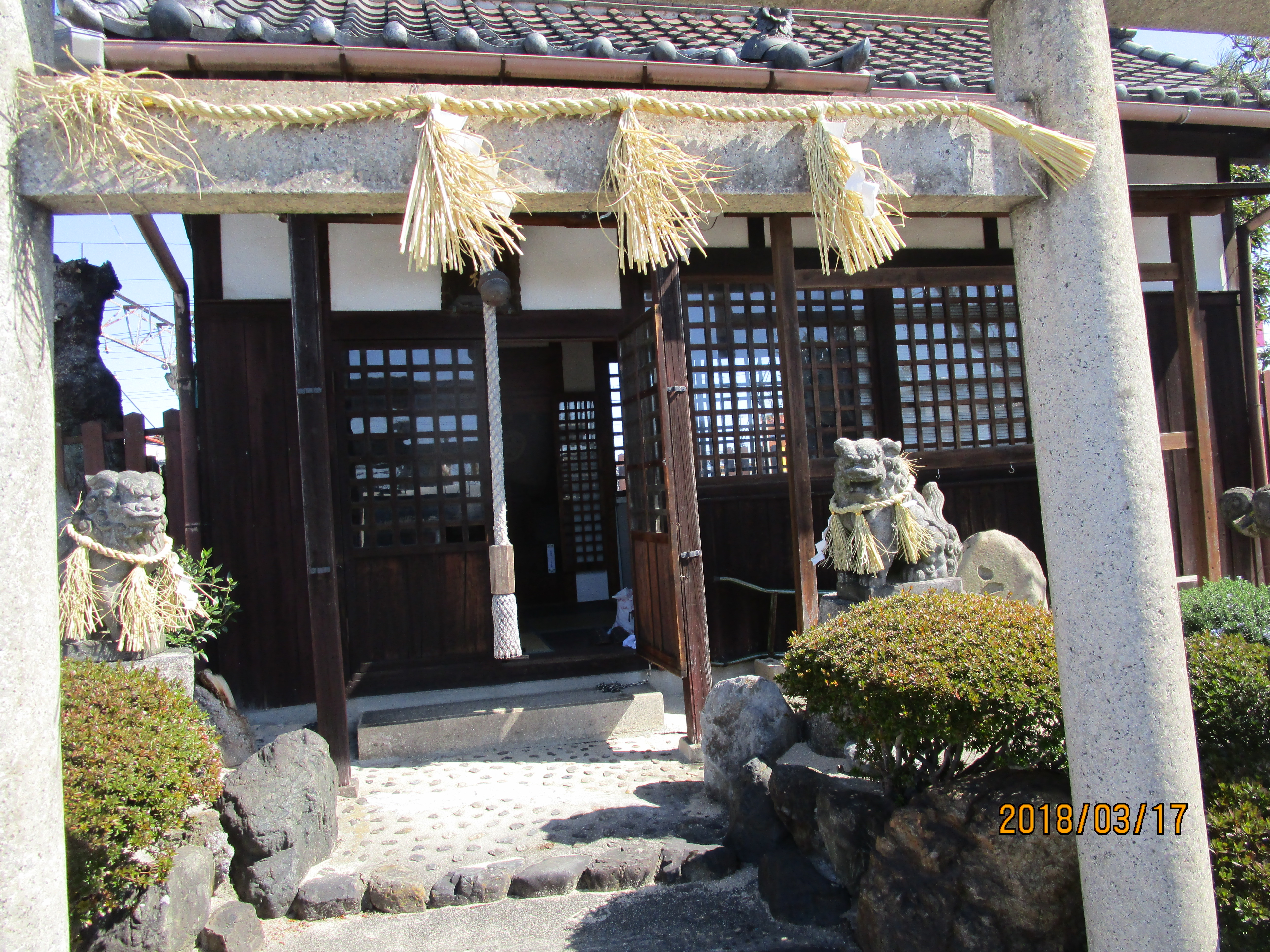 四日市市のＪＲ富田駅前にある庚申社